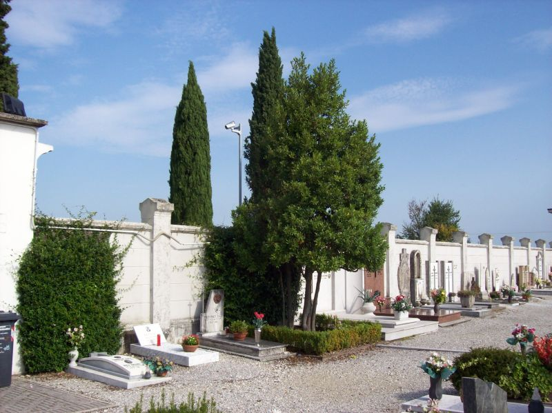 La tomba di Pier Paolo Pasolini, nel cimitero di Casarsa della Delizia (PN)